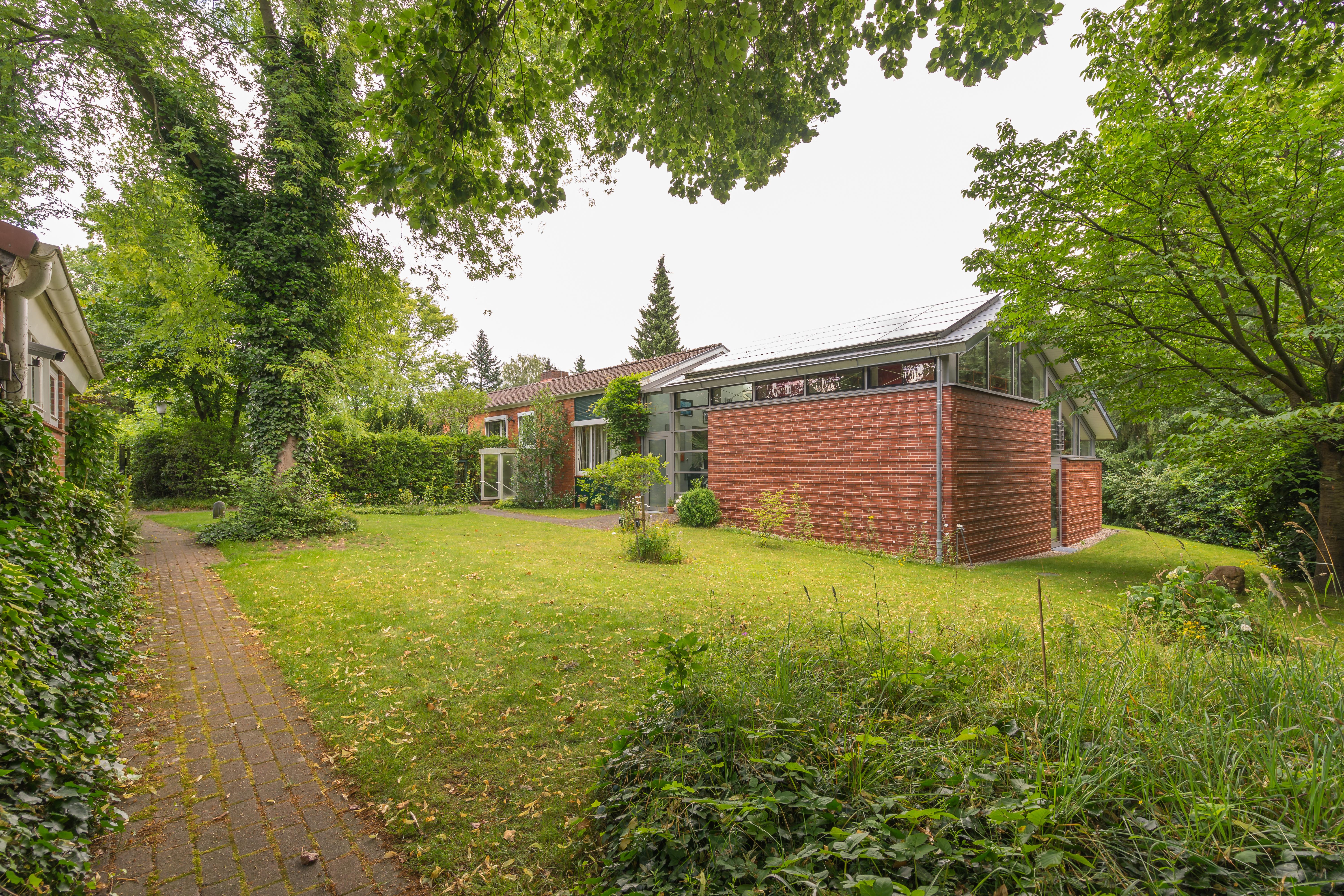 ehemaliges Wohnhaus von Helmut und Loki Schmidt, Neubergerweg 80 in Hamburg-Langenhorn, Gartenansicht mit Archivanbau